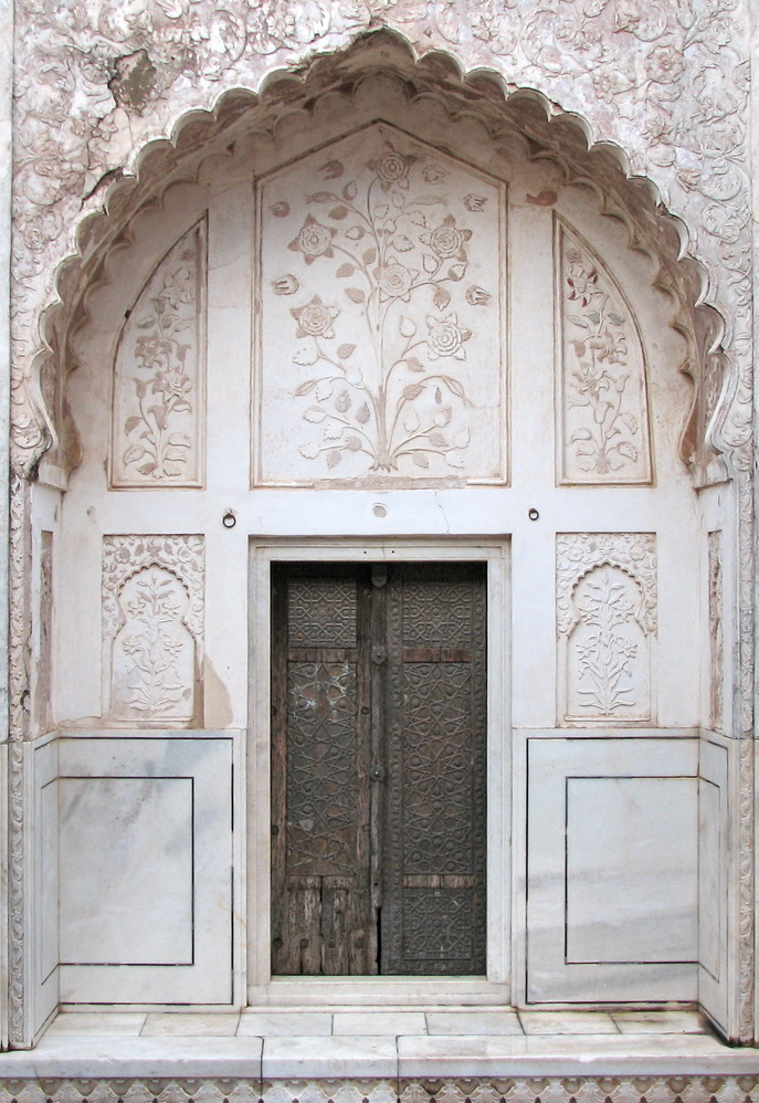 Intricately worked door of Bibi ka Maqbara,Aurangabad, Maharashtra, India